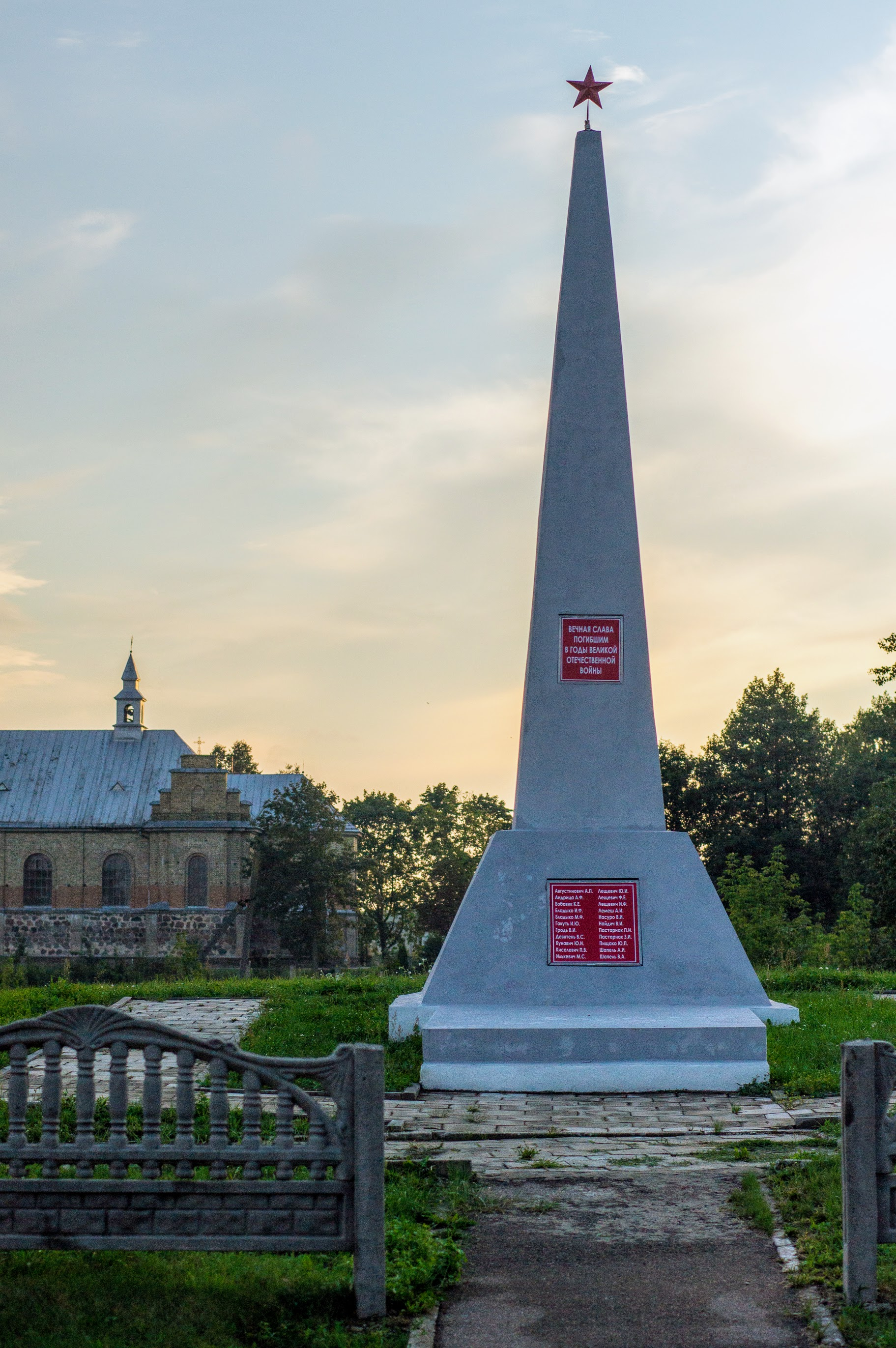 Помнік ахвярам Другой сусветнай вайны